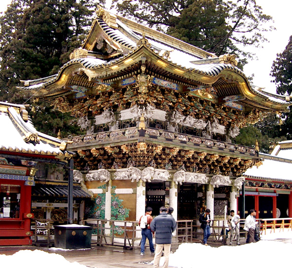 日光東照宮陽明門